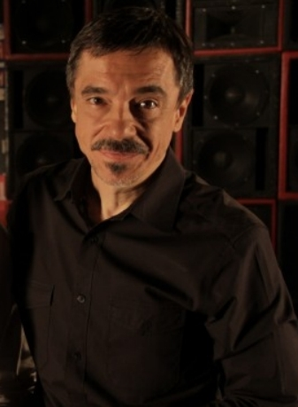 Charles de Souza Gavin (São Paulo, 9 de julho de 1960) é um músico brasileiro, conhecido por ser um dos fundadores do grupo RPM (dando lugar posteriormente a Paulo P.A. Pagni), e de ter participado de bandas como Ira!, entre 1982 e 1984 e principalmente Titãs, de 1985 até 2010.